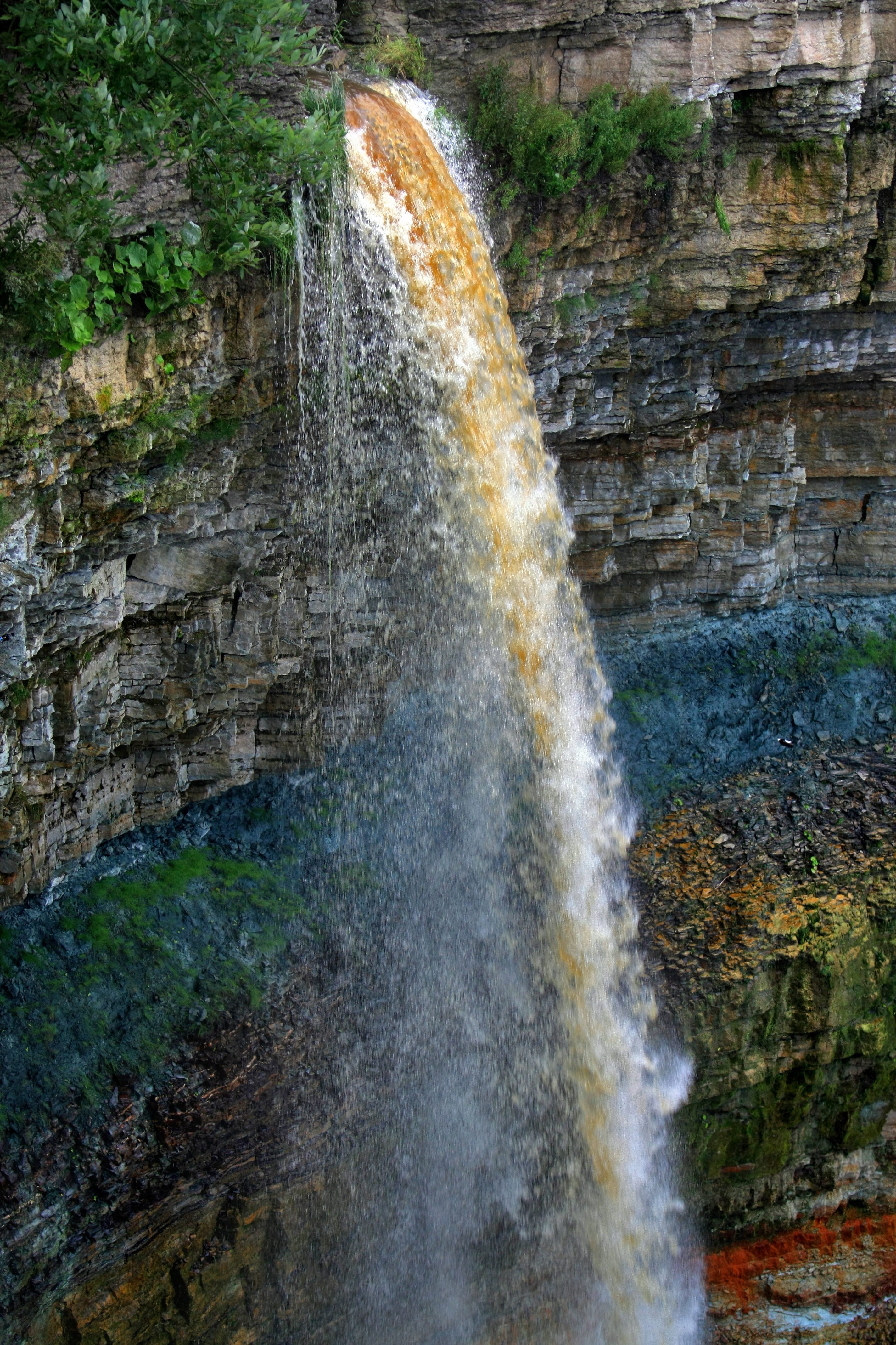 Valaste juga